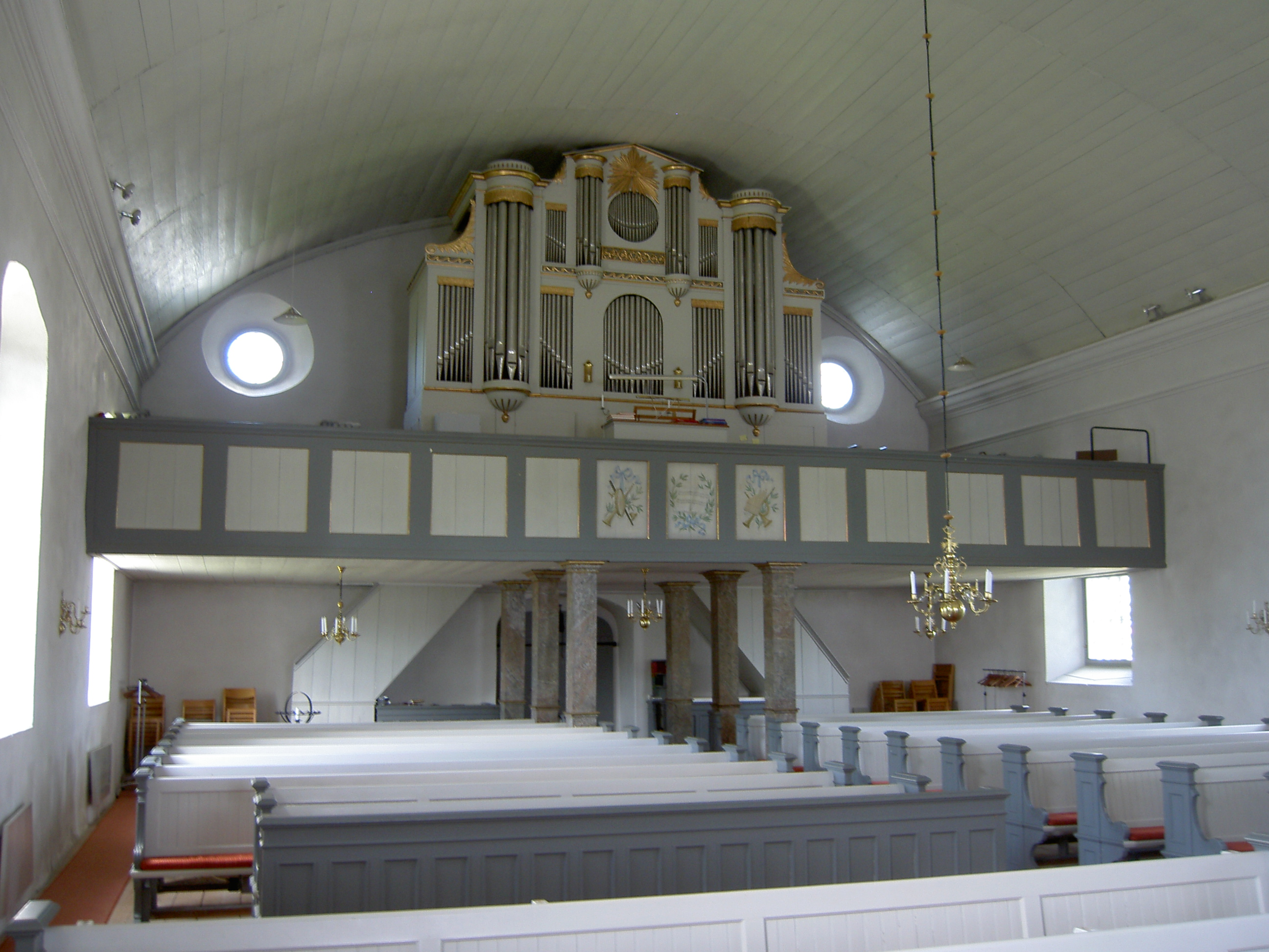 Kyrksal med orgelläktare i Tjärstads kyrka